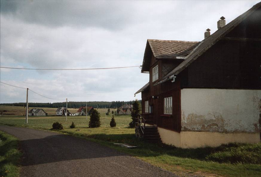 Abendstimmung in Rolava (Sauersack)